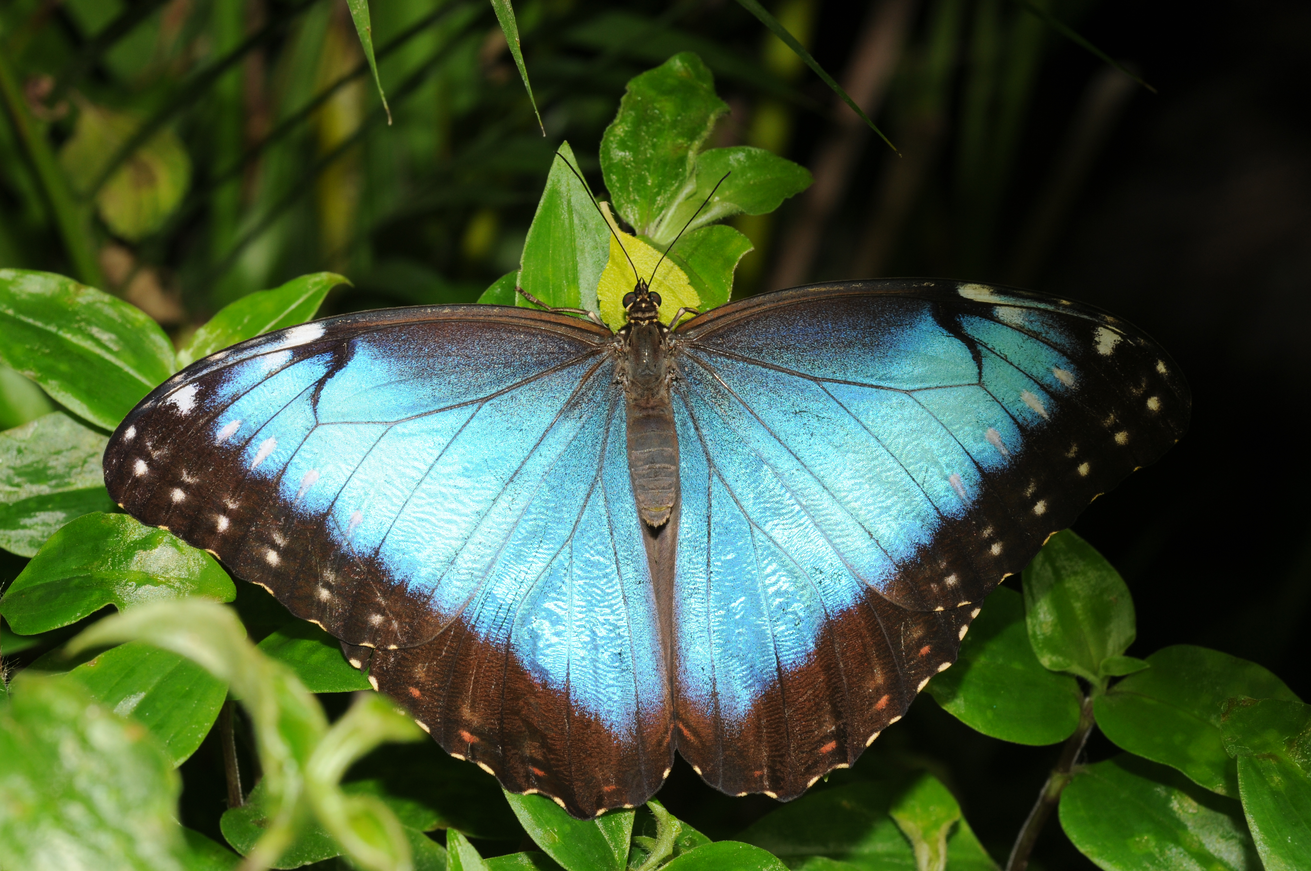 Morpho peleides. Jardin des papillons (Hunawihr).